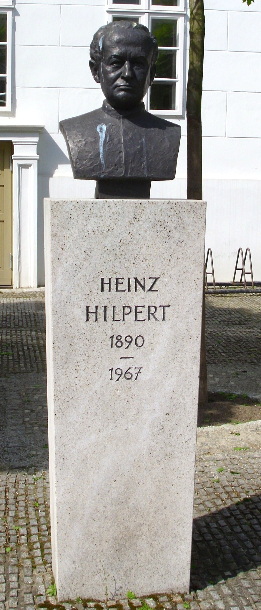 Büste von Heinz Hilpert vor dem Deutschen Theater Berlin, geschaffen von Eberhard Bachmann. Heinz Hilpert war von 1934-1944 Intendant des Deutschen Theaters Berlin und Regisseur an mehreren führenden deutschen Bühnen.